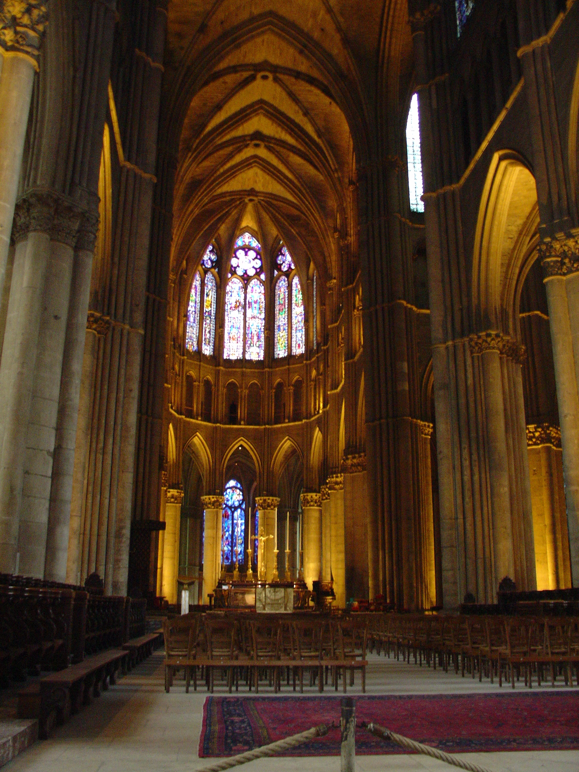 Kathedraal van Reims - interieur